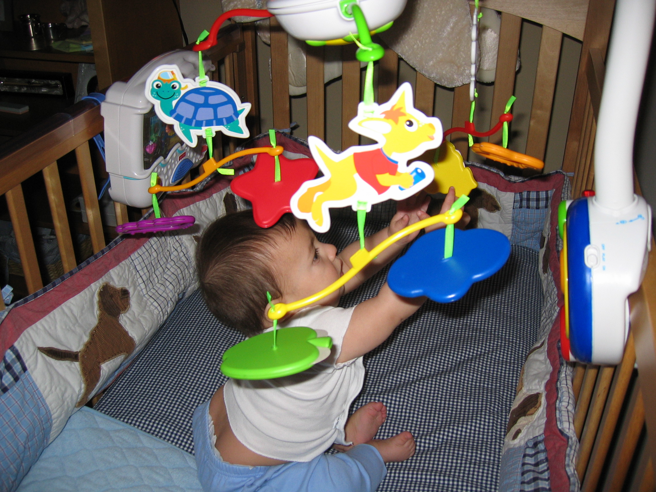 Baby Einstein mobile